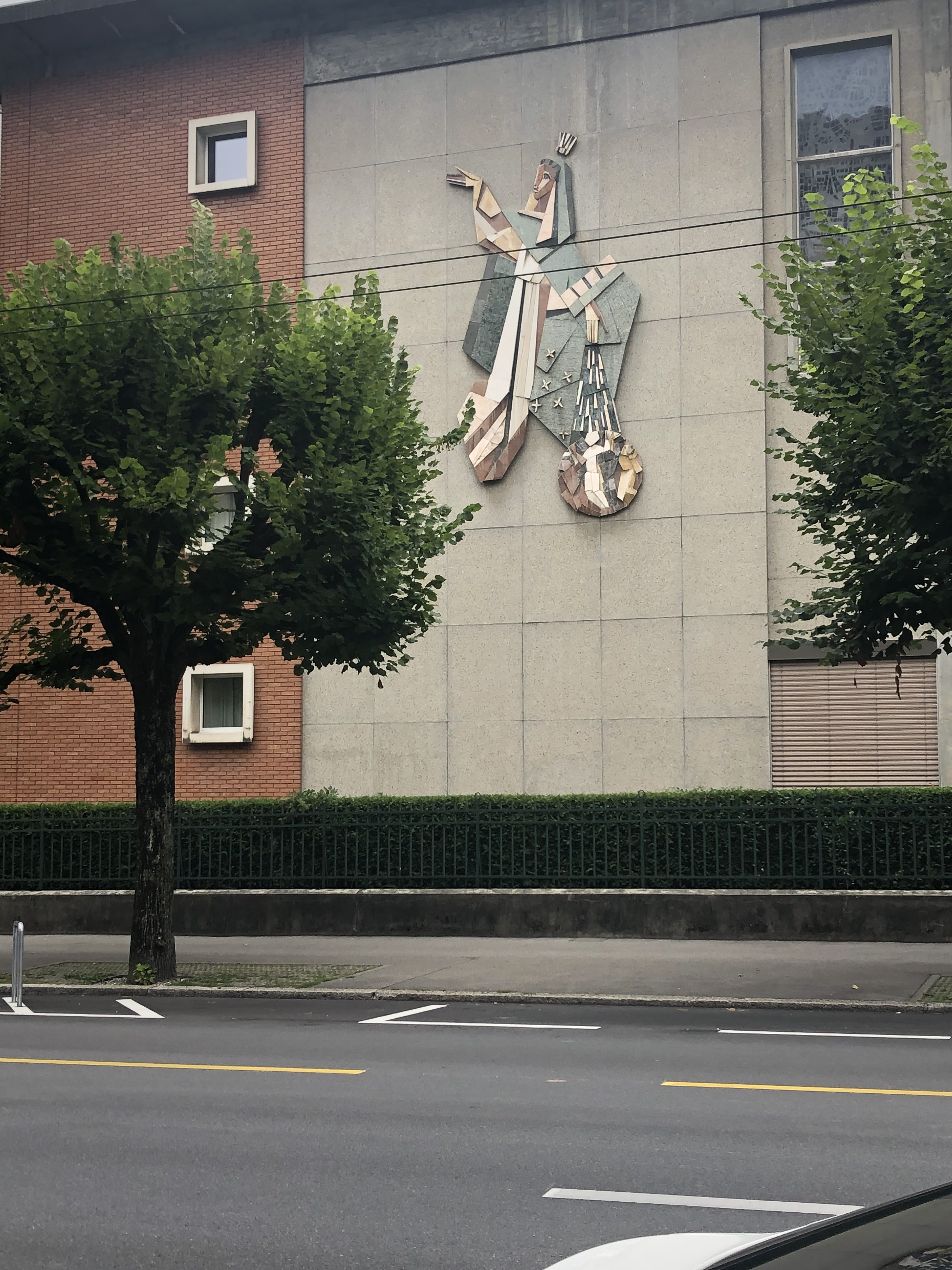 Universität Freiburg (Schweiz): Wandrelief Regina Mundi